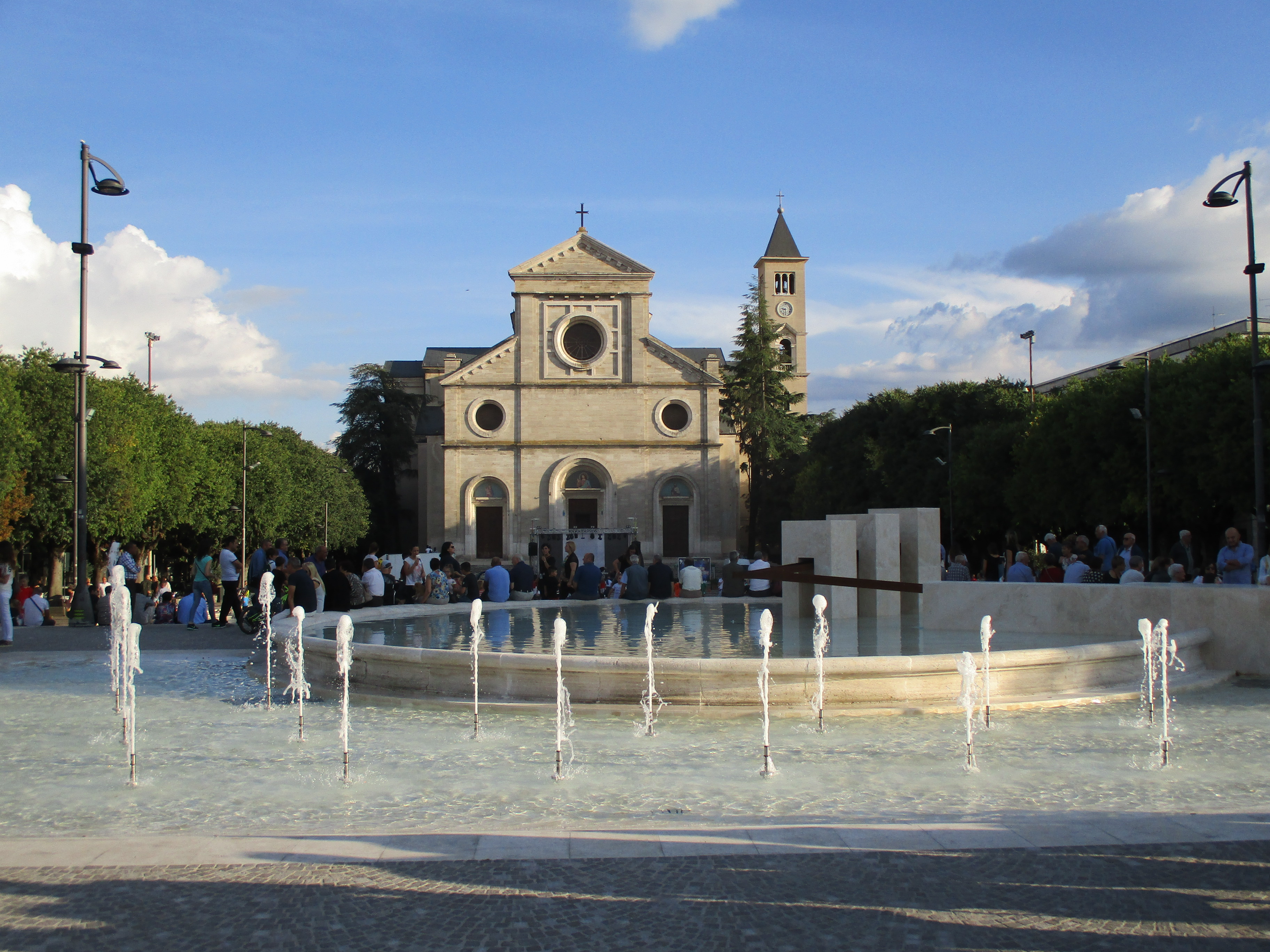 La nuova fontana